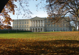 Kungliga slottet i Oslo.